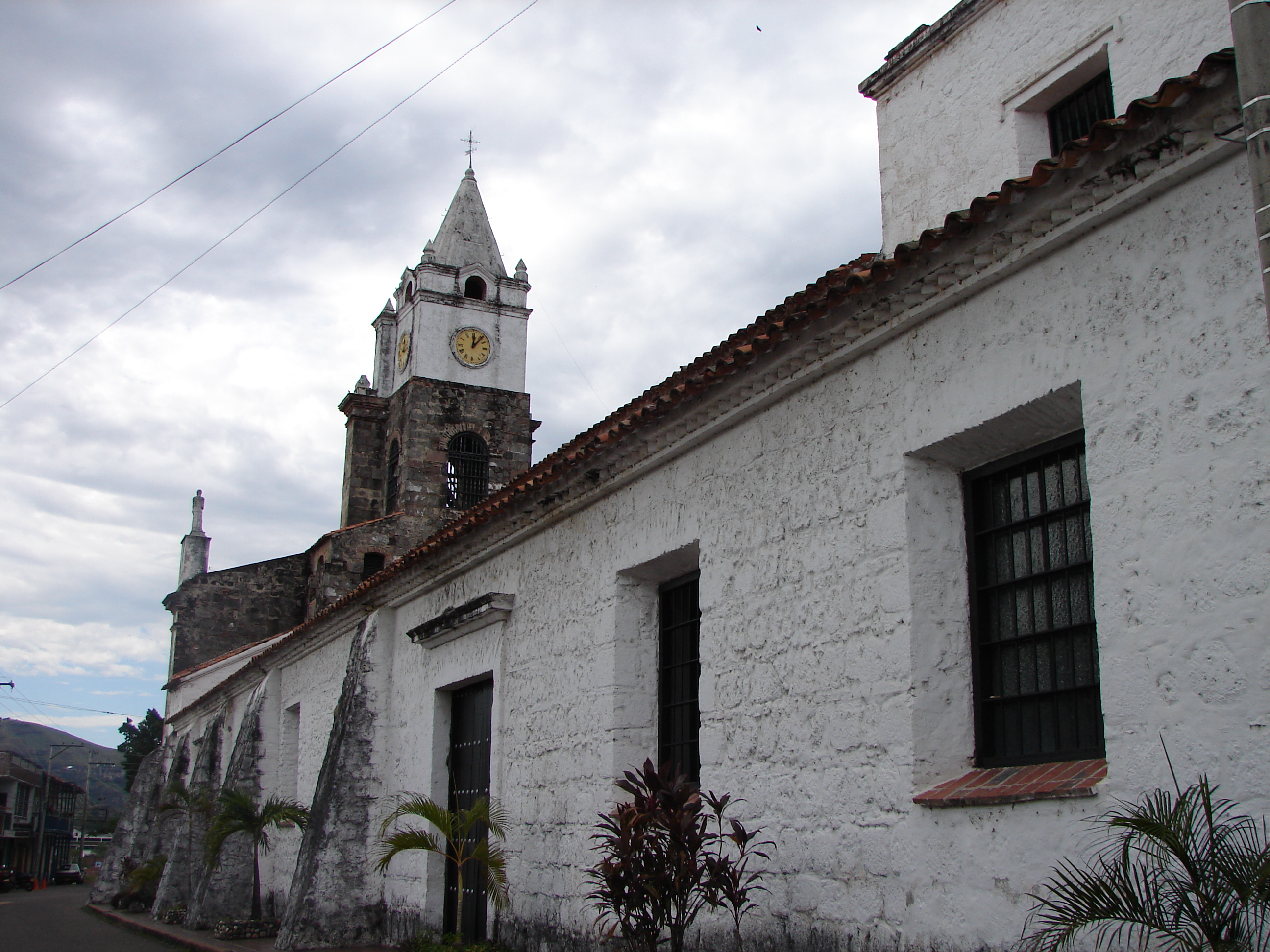 Iglesia Nuestra Señora El Rosario, Honda, Tolima.